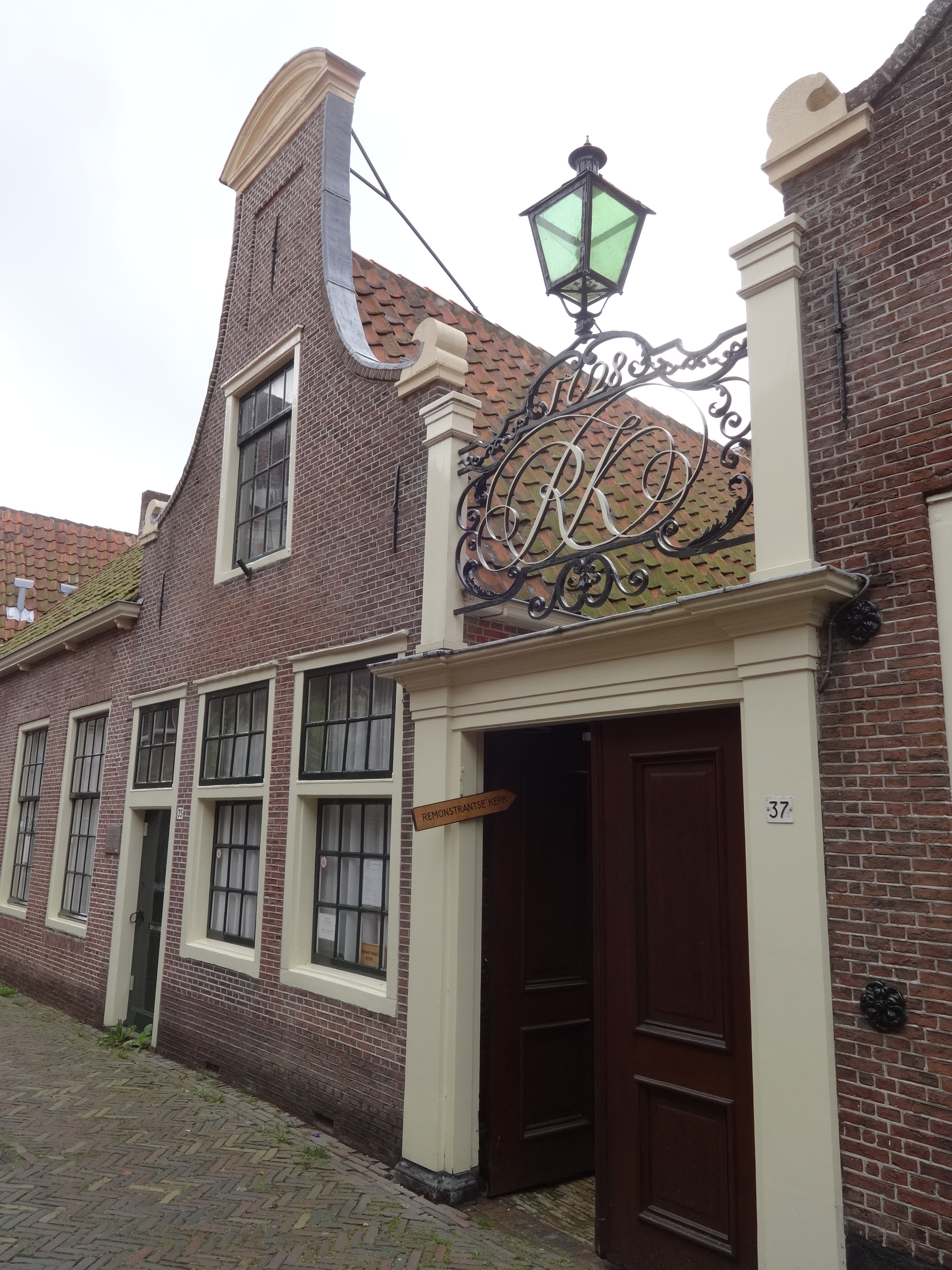 Remonstrantse kerk Alkmaar, view from NW~